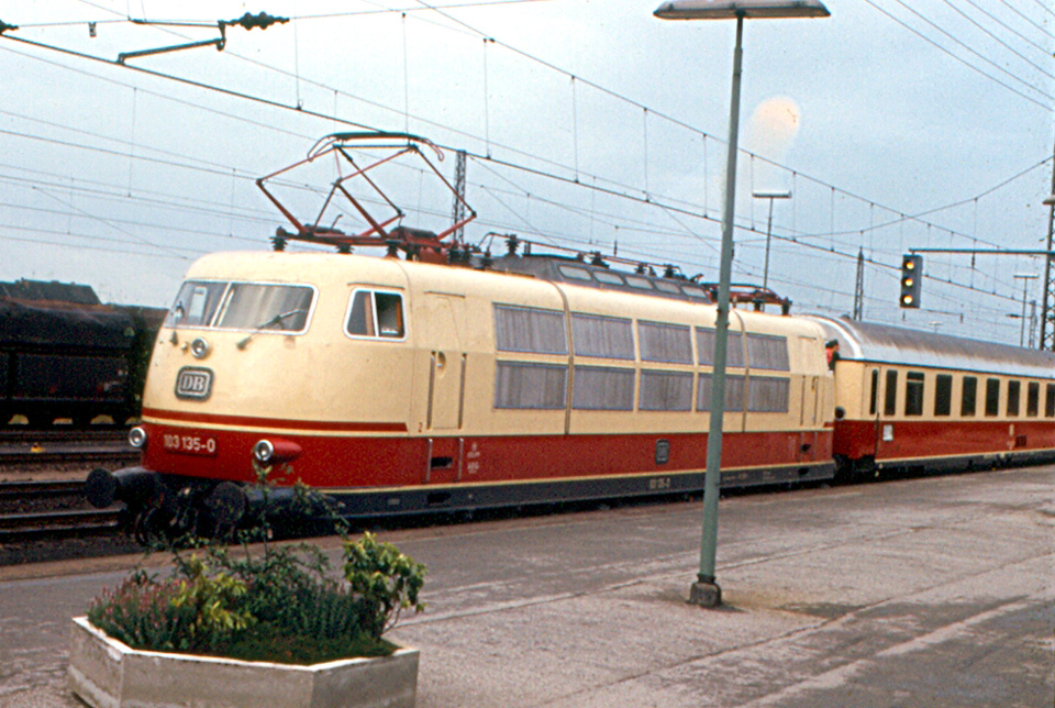 103 135 in Emmerich am 25. Juli 1973.